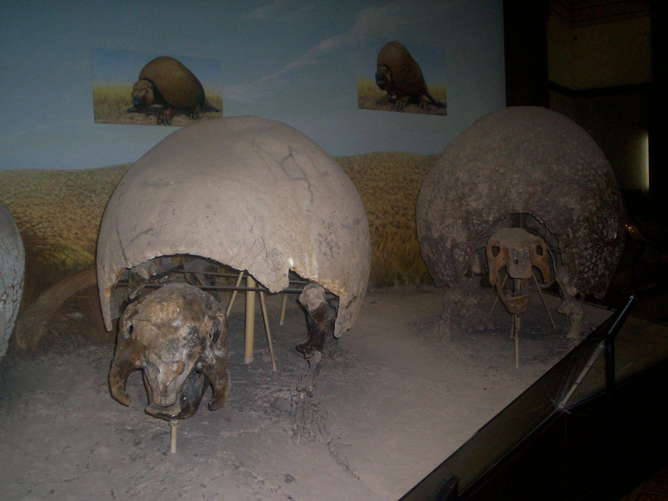 Sala de Notoungulados de la colección del Museo de La Plata. Lo que se observa son xenarthras. Foto tomada el 3 de noviembre de 2005.